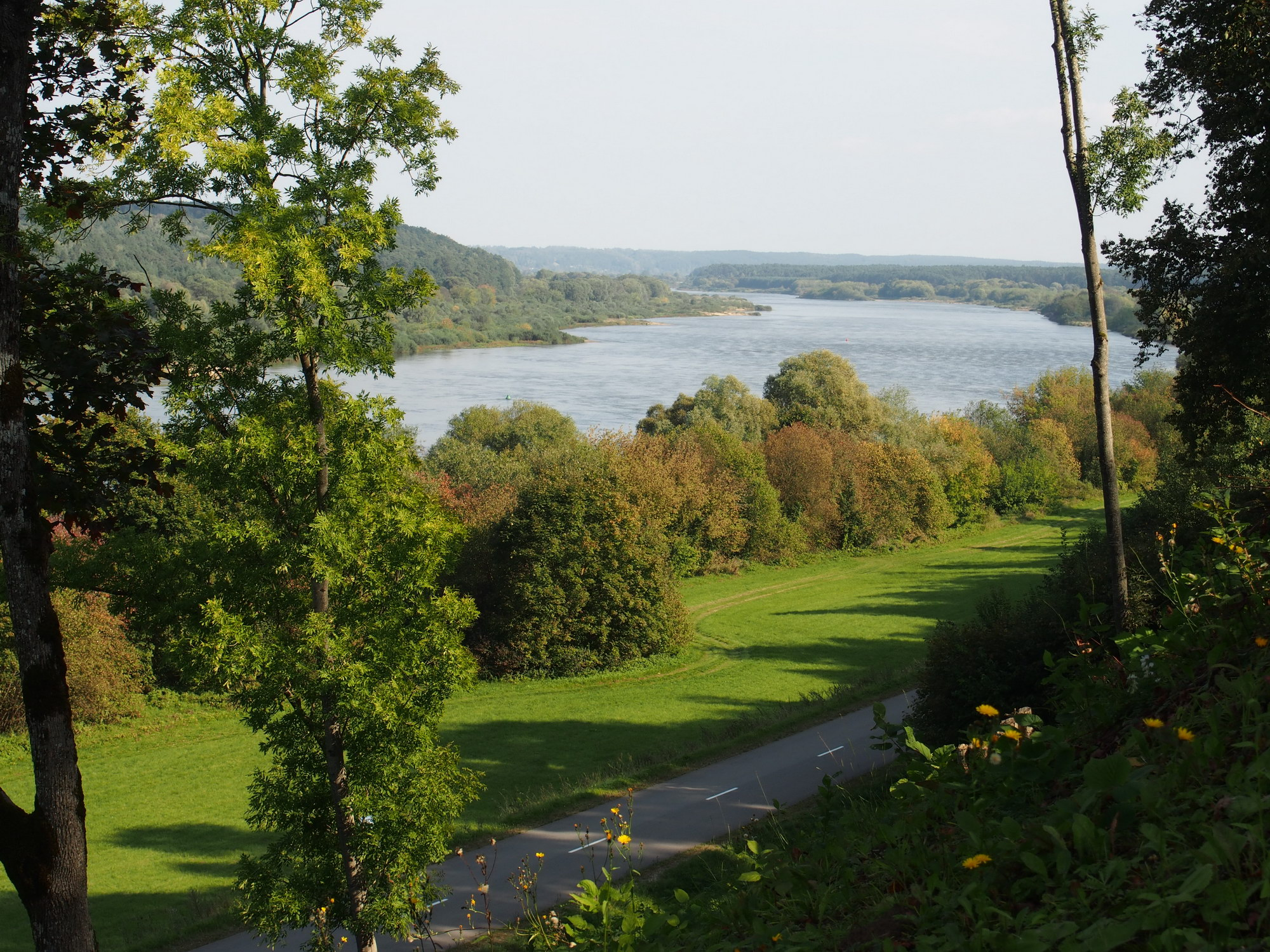 Vaizdas į Nemuną nuo Žemosios Panemunės piliakalnio